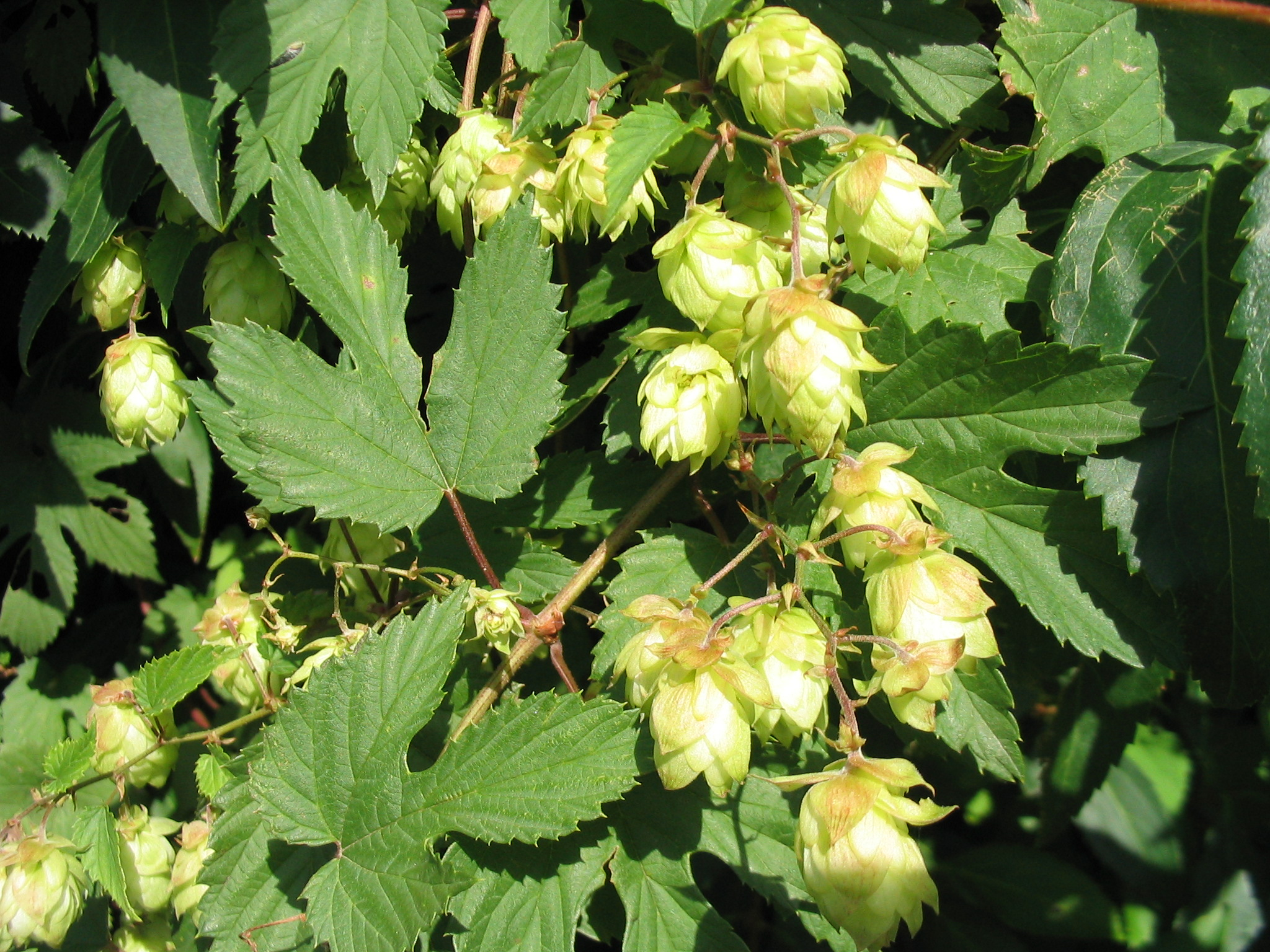 Fruchtstand von Wildem Hopfen, Humulus lupulus, fotografiert am 22.08.2004 Fotograf: Dr. Hagen Graebner